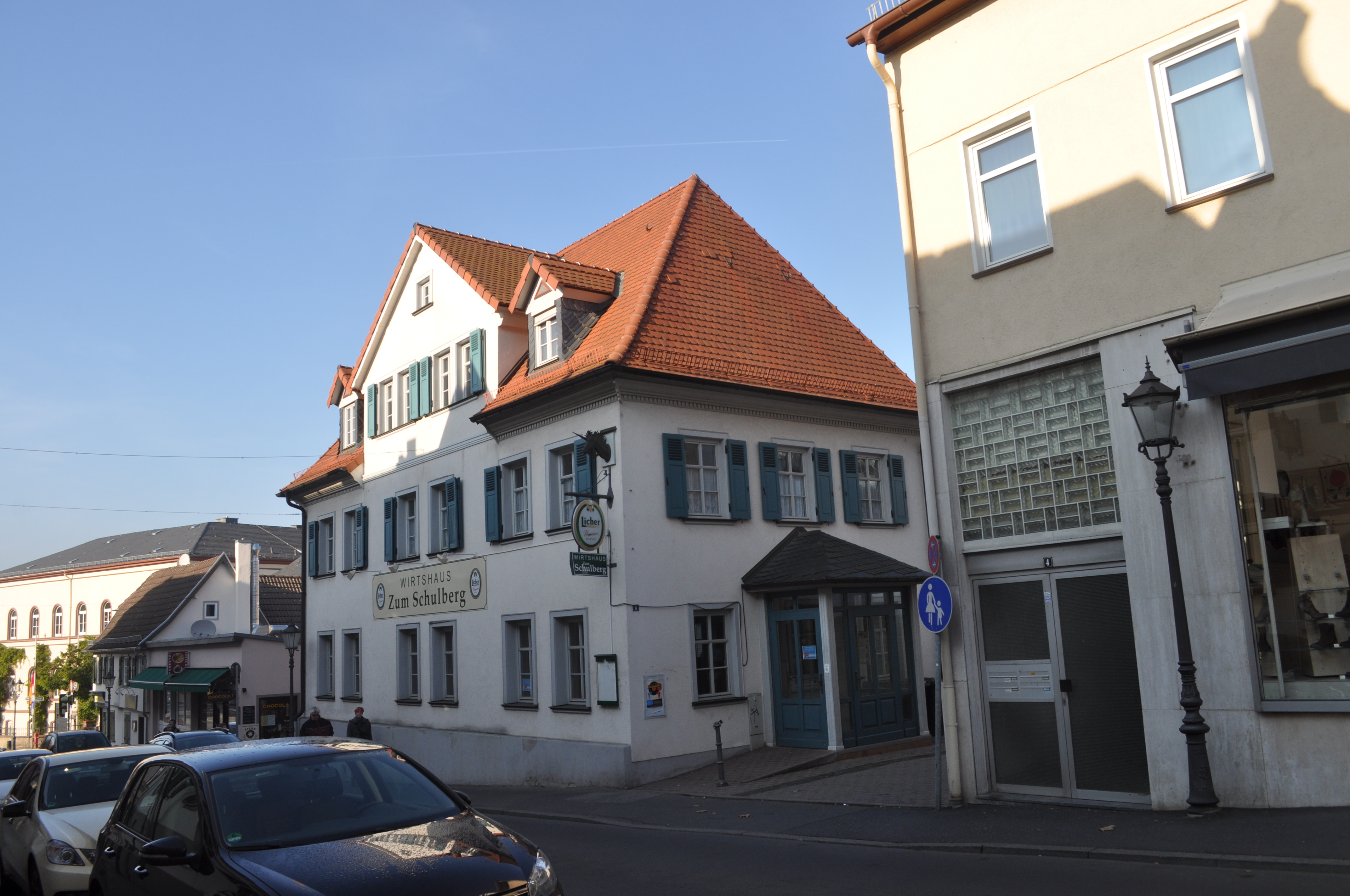 Denkmalgeschütztes Haus Schulberg 6 in Bad Homburg